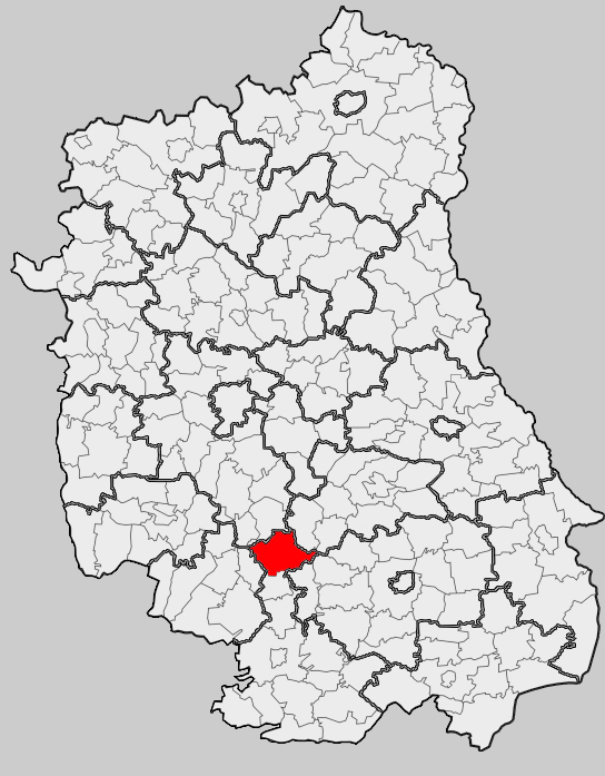 Map of gmina Turobin, Biłgoraj county, Lublin voivodship Mapa gminy Turobin, powiat biłgorajski, województwo lubelskie